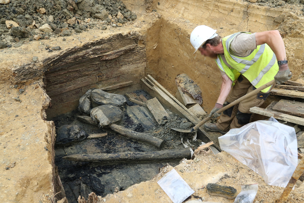 Ausgrabung der Höhe 80 in Wijtschate, Schützengraben mit Holzplanken und Sandsäcken